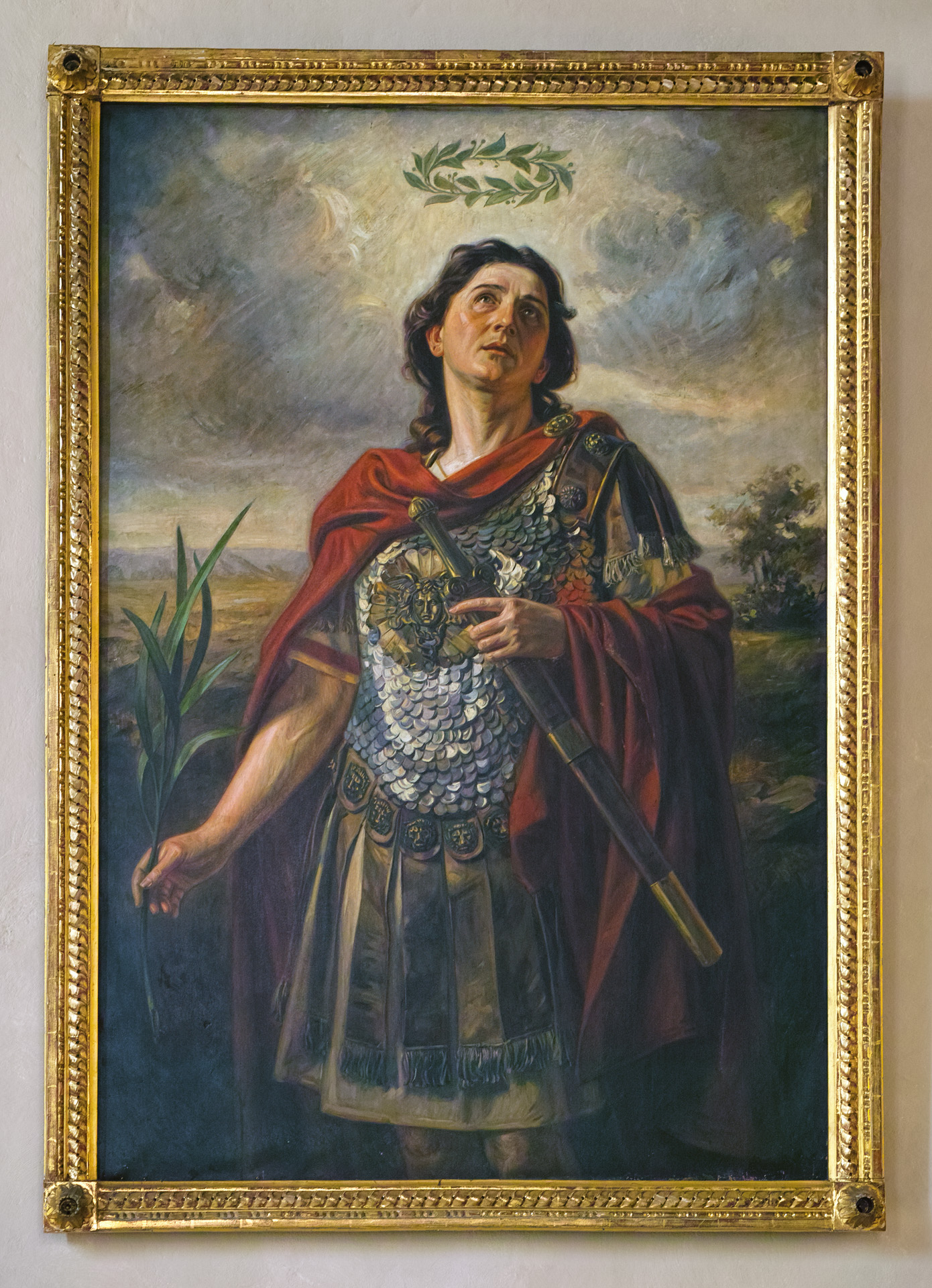 obraz svatého Auraciána v katedrále svatého Mikuláše, Č. Budějovice, namaloval F. B. Doubek 1912